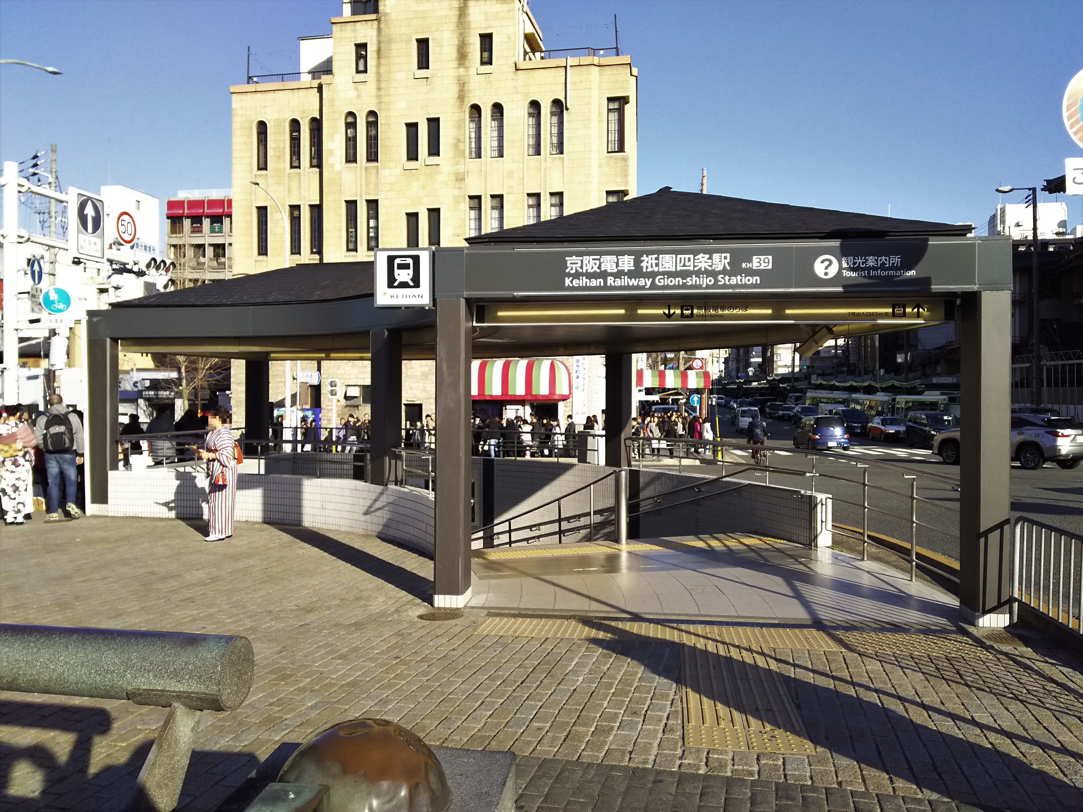 京阪本線祇園四条駅出入り口（京都市東山区）